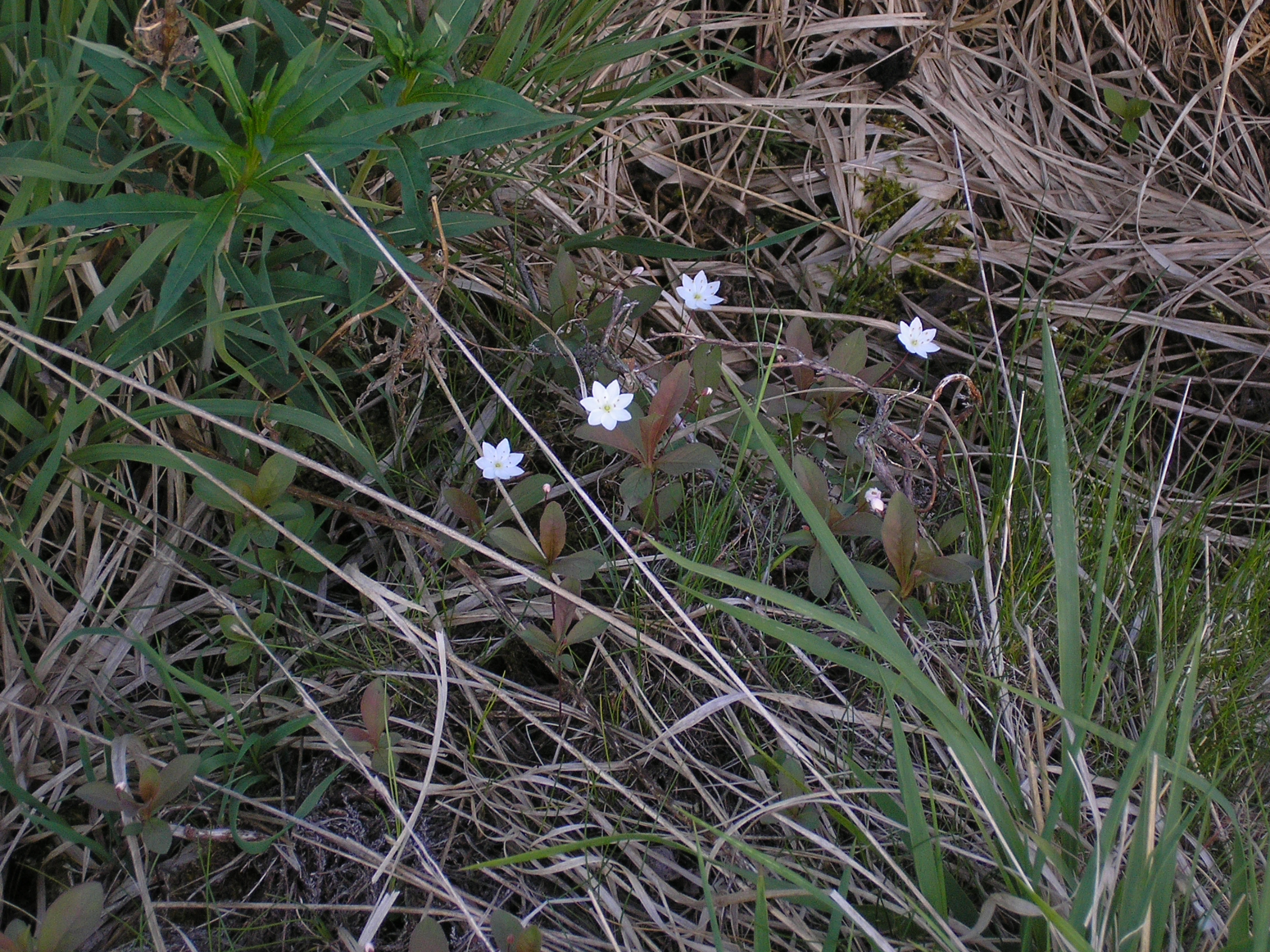 Polleurvenn, Siebenstern, East Belgium